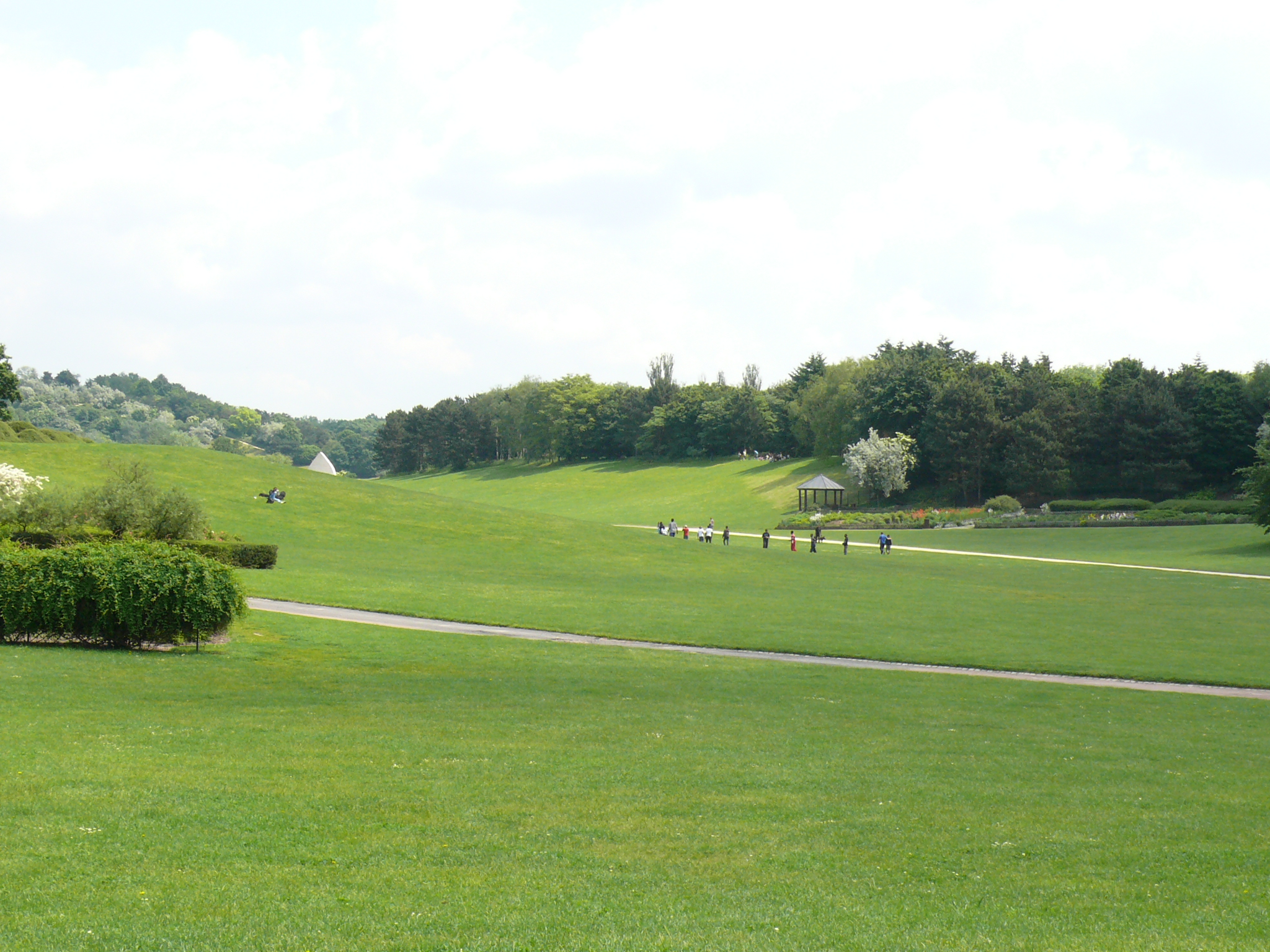 Parc départemental de La Courneuve (Seine-Saint-Denis - Île-de-France - France) près de l'entrée de Stains